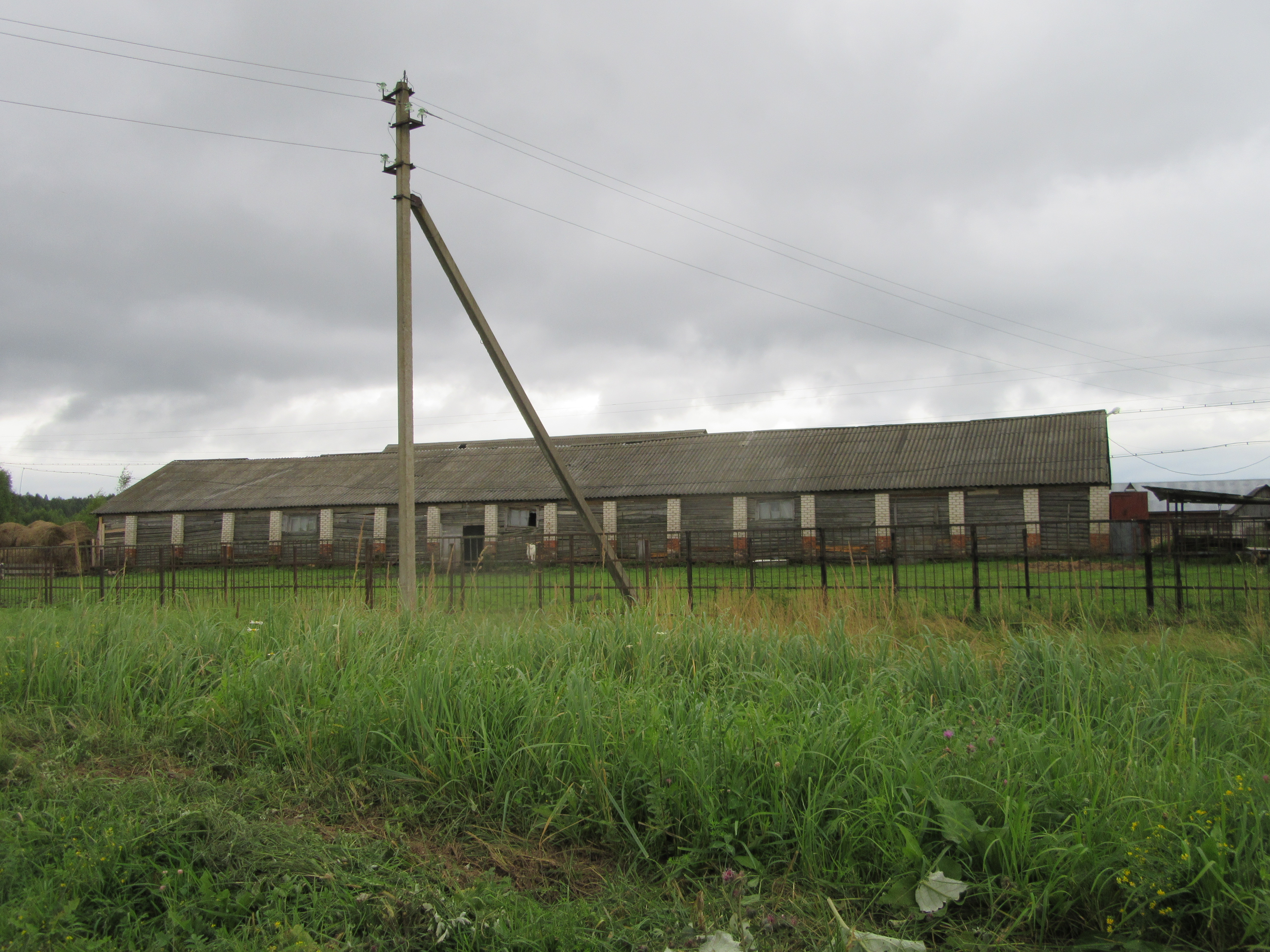 Конюшня в Фокино